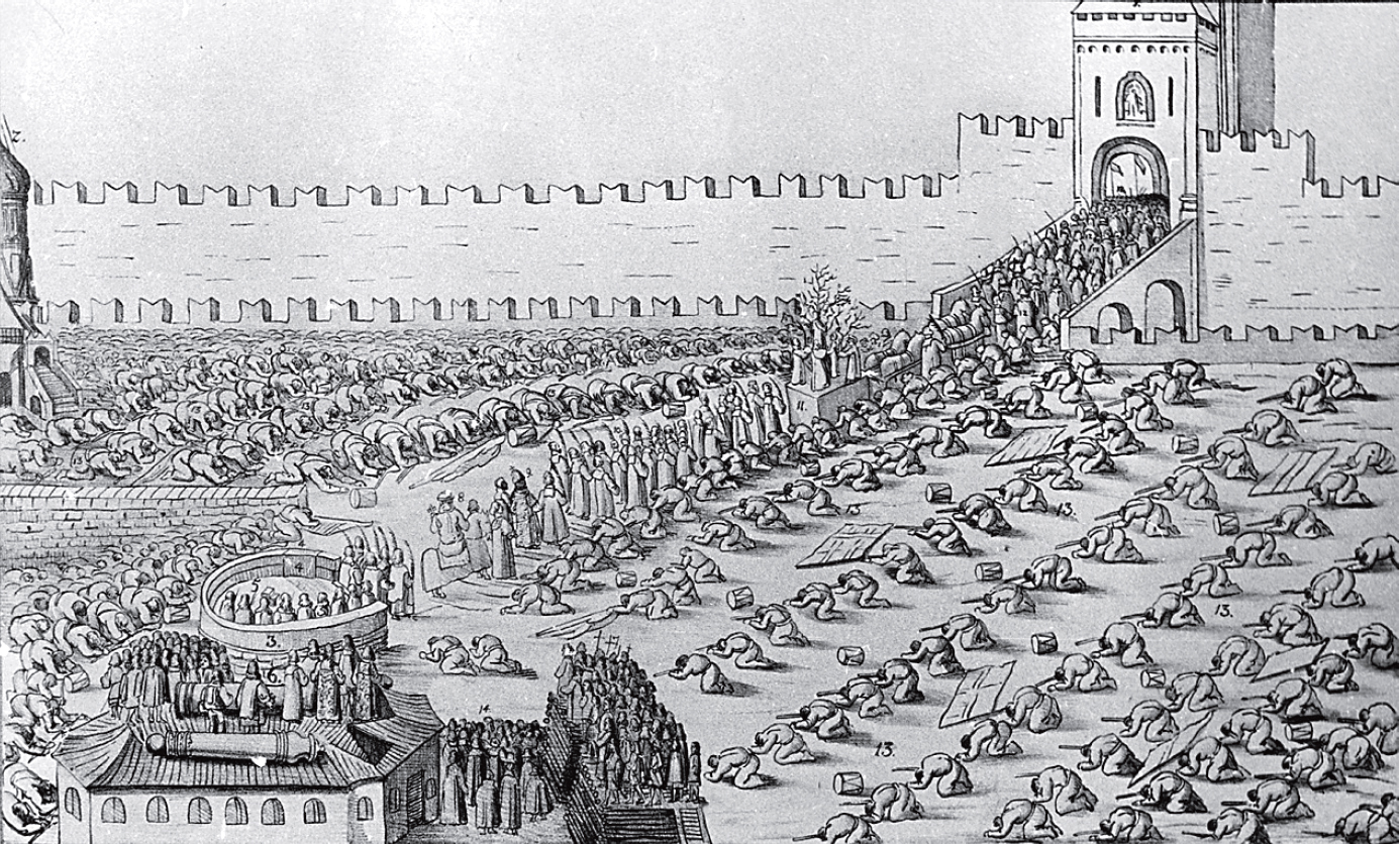 рисунок автрийского посла в Московском государстве, изображен Кремль, царь ведущий лошадь, но которой восседает патриарх православной российской церкви, по обеим сторонам шествия лежат ниц московские стрельцы.Беларуская (тарашкевіца): Арыгінальны абрад Маскоўскай царквы «Шествие на осляти», які ўчыняўся на Вербніцу. Масква, 1654 год